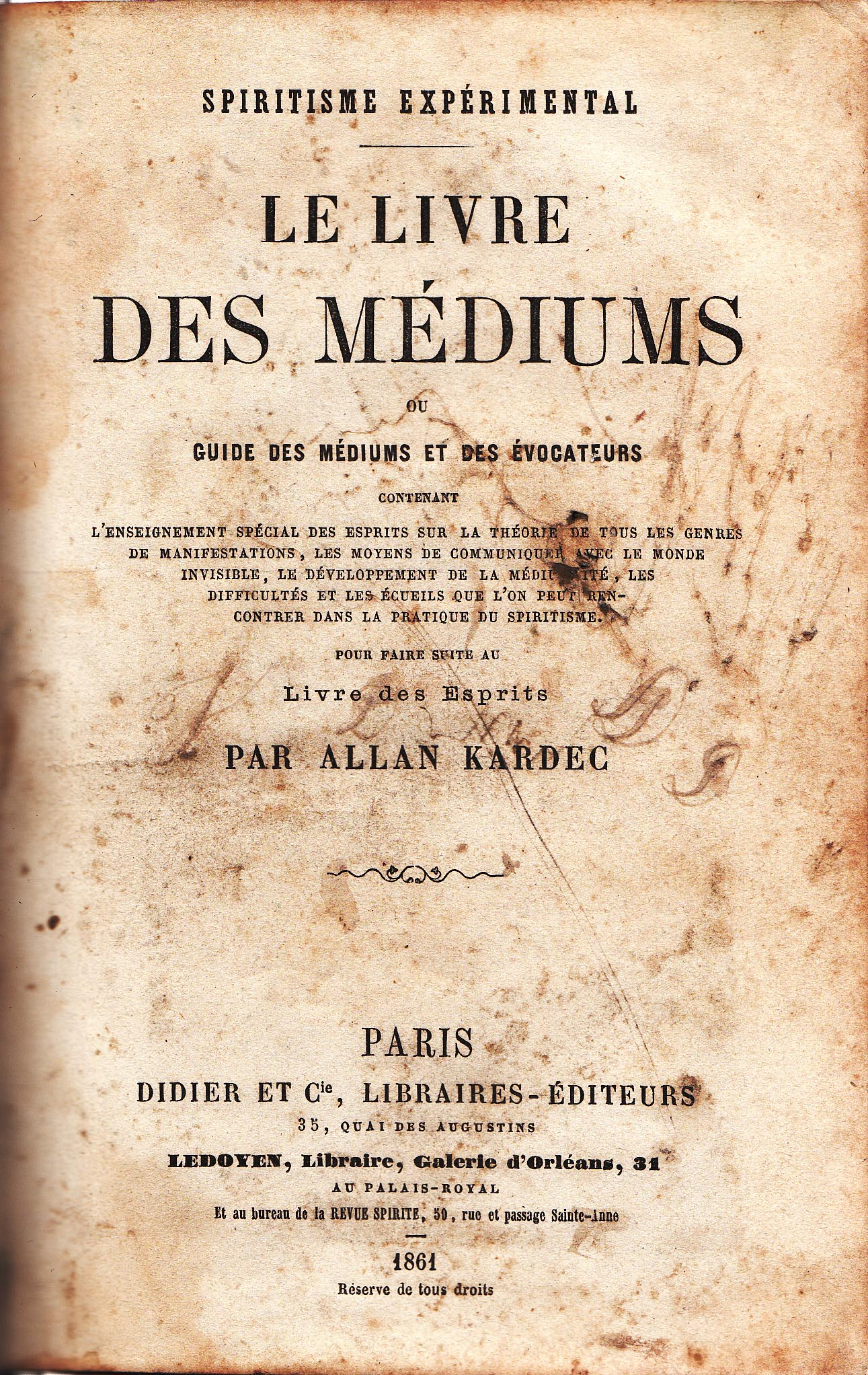 Page de Garde du Livre des Médiums, édition de 1861.